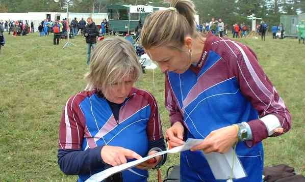 Monica och Annika på Gotland 2007